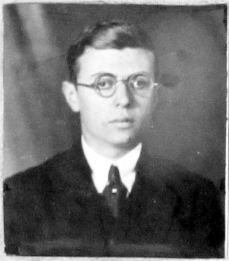 Jean-Paul Sartre, photo d'identité auteur inconnu. Trombinoscope 1924 de l’École normale supérieure (rue d'Ulm, Paris, 5è arrond.) - Fonds photographiques, PHO D/2/1924/1.